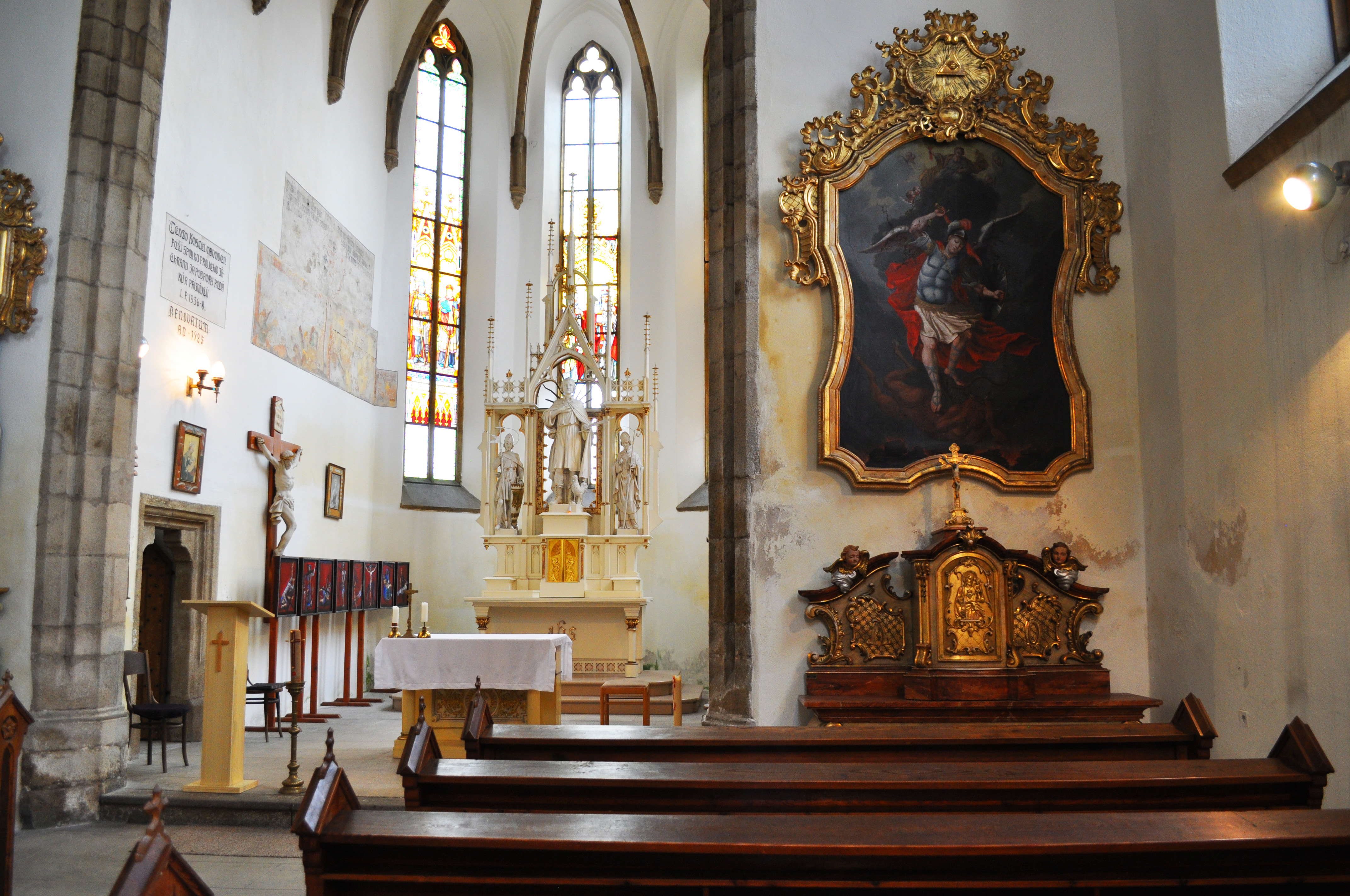 interiér